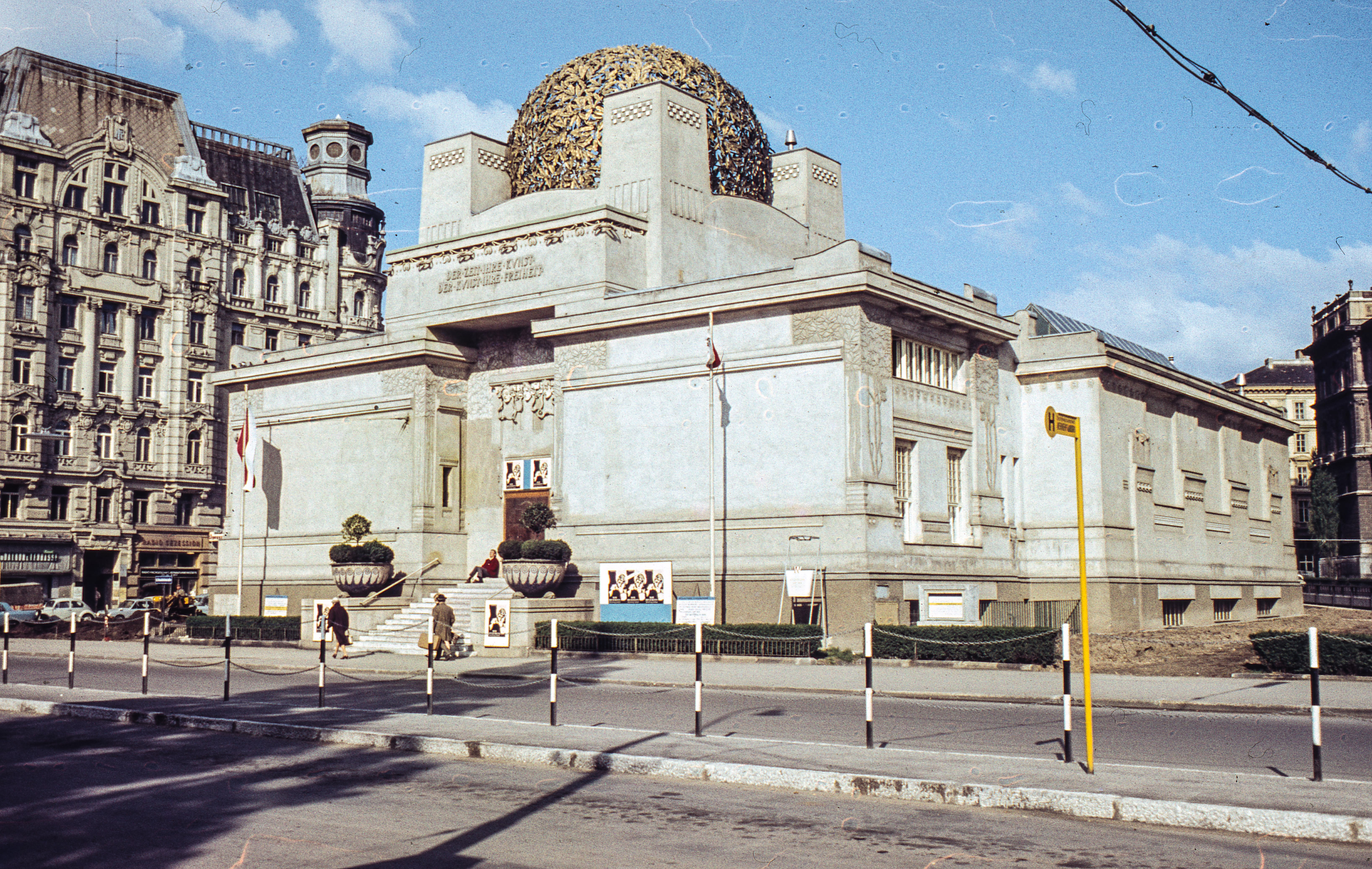 Friedrichstrasse, Szecessziós ház (Secession). Location: Austria, Vienna Tags: colorful, Secession Title: Friedrichstrasse, Szecessziós ház (Secession).